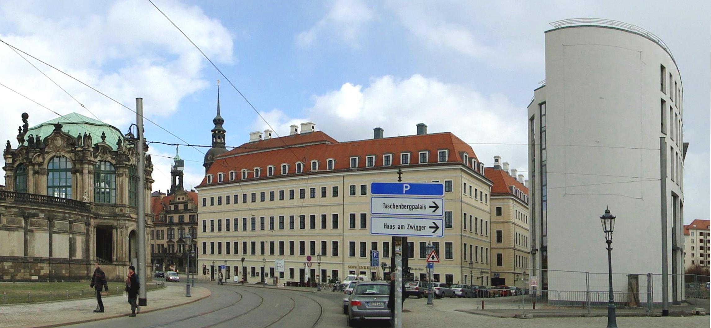 Panorama Zwinger-Schloss-Taschenbergpalais-Advantariegel-Gedenkstätte Sophienkirche-Haus am Zwinger (v.l.n.r.)